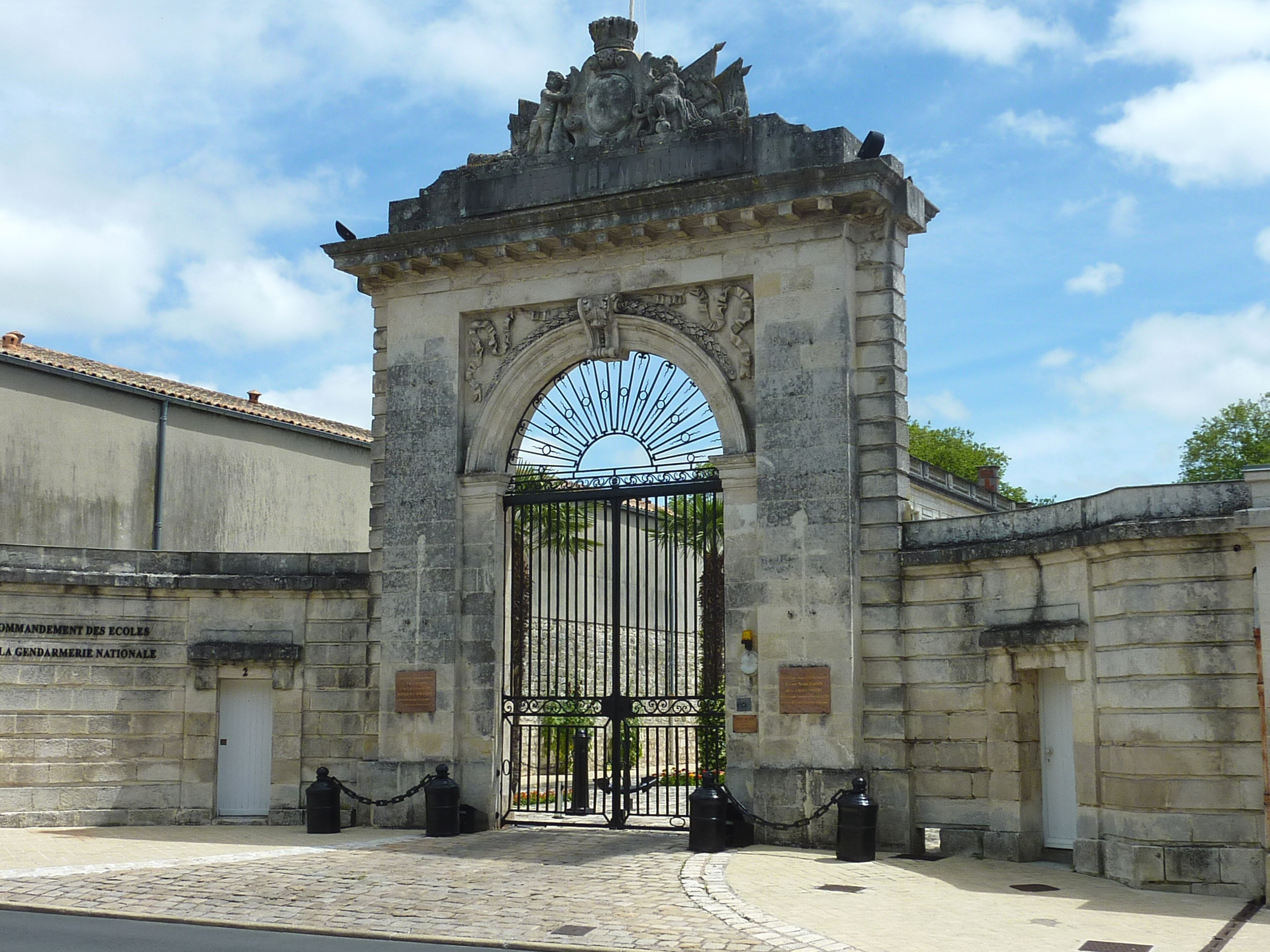 Porte de l'ancienne maison du Roy et ex-préfecture maritime Rochefort Charente Maritime France